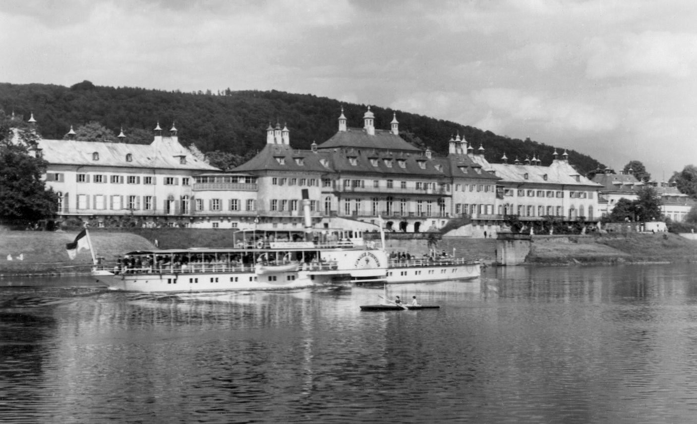 Pillnitz; Schloß Pillnitz - Elbe mit Dampfer Junger Pionier This postcard is from publisher Brück & Sohn in Meißen ( postcard has a unique number 28893 and is available in a higher resolution at the publisher. This images was uploaded in a cooperation project between Wikipedians and the publisher.